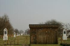 A Kálvária székelykapuval, Kiskunfélegyháza